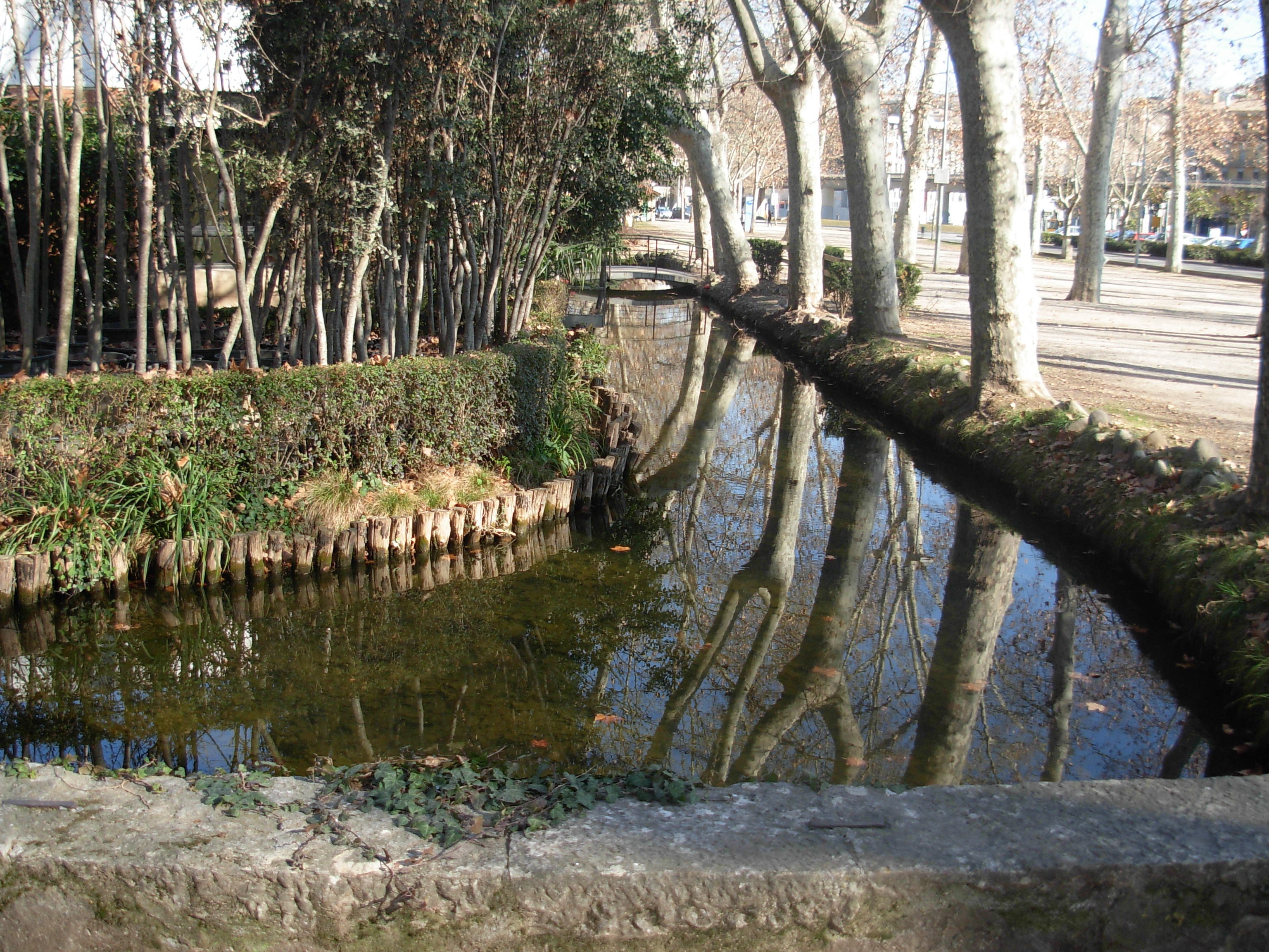 rierol que cerca la Devesa